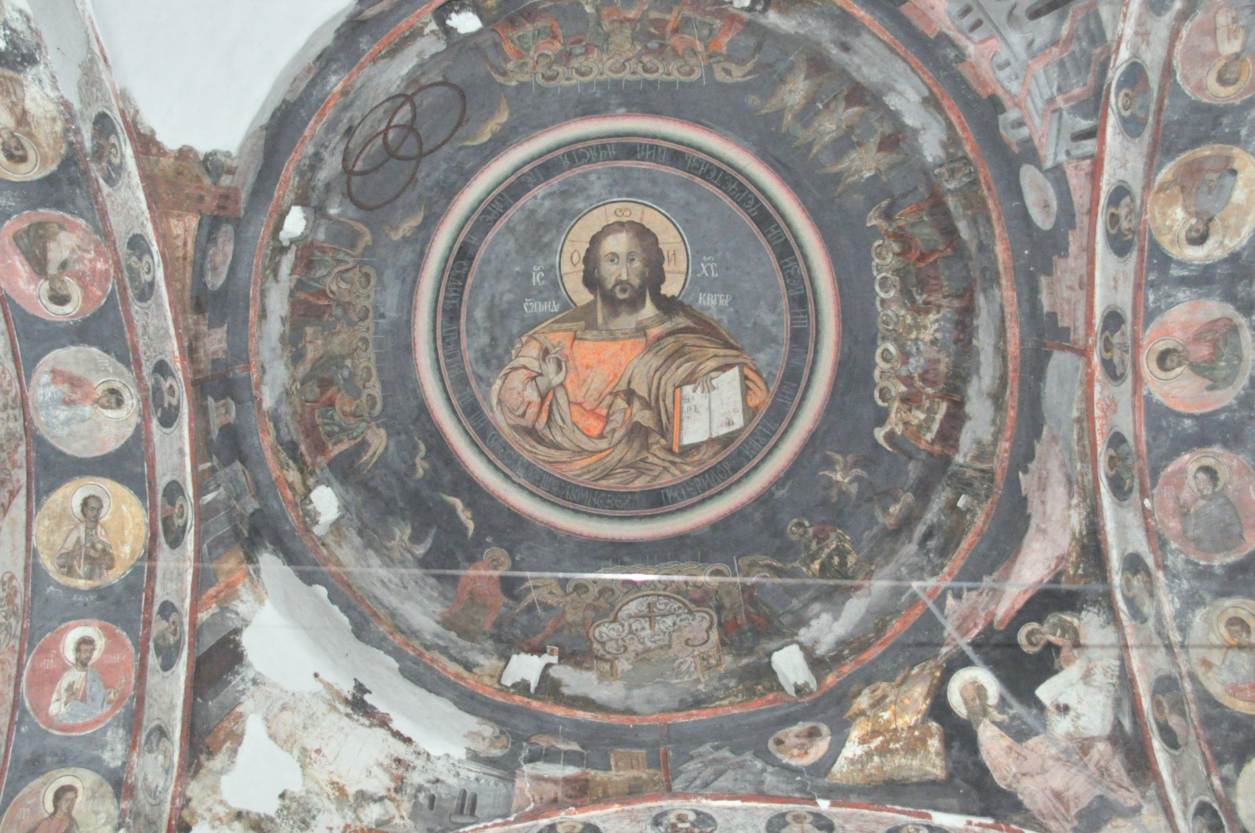 Biserica „Sfânta Treime”, sat Cerneți; comuna Șimian